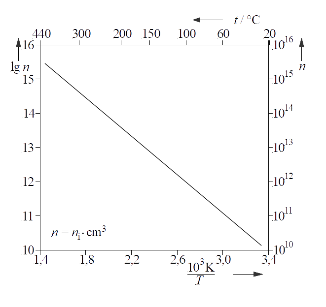 Arrheniusgraph: Eigenleitungsdichte von Silicium in Abhängigkeit von der Temperatur